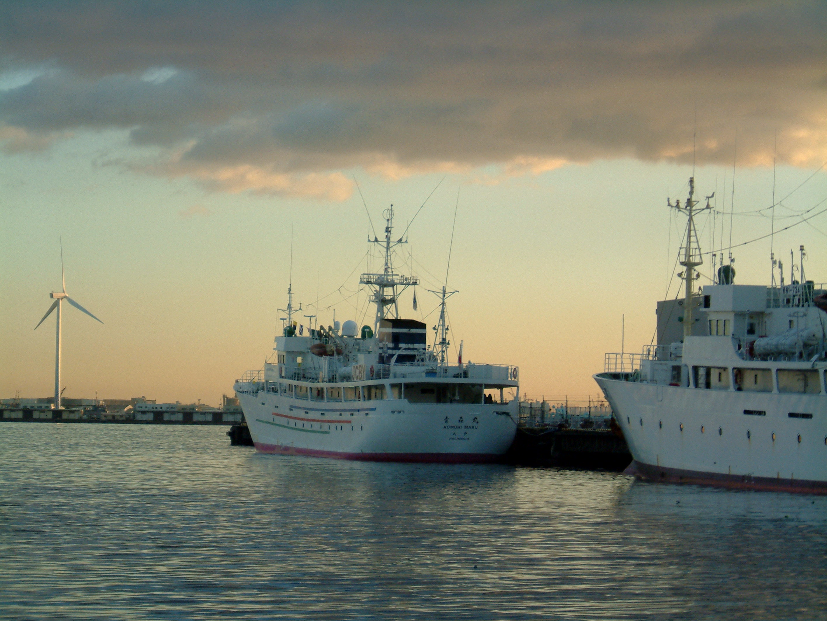 八戸水産高校の漁業実習船青森丸 2009年11月15日に横浜港で撮影